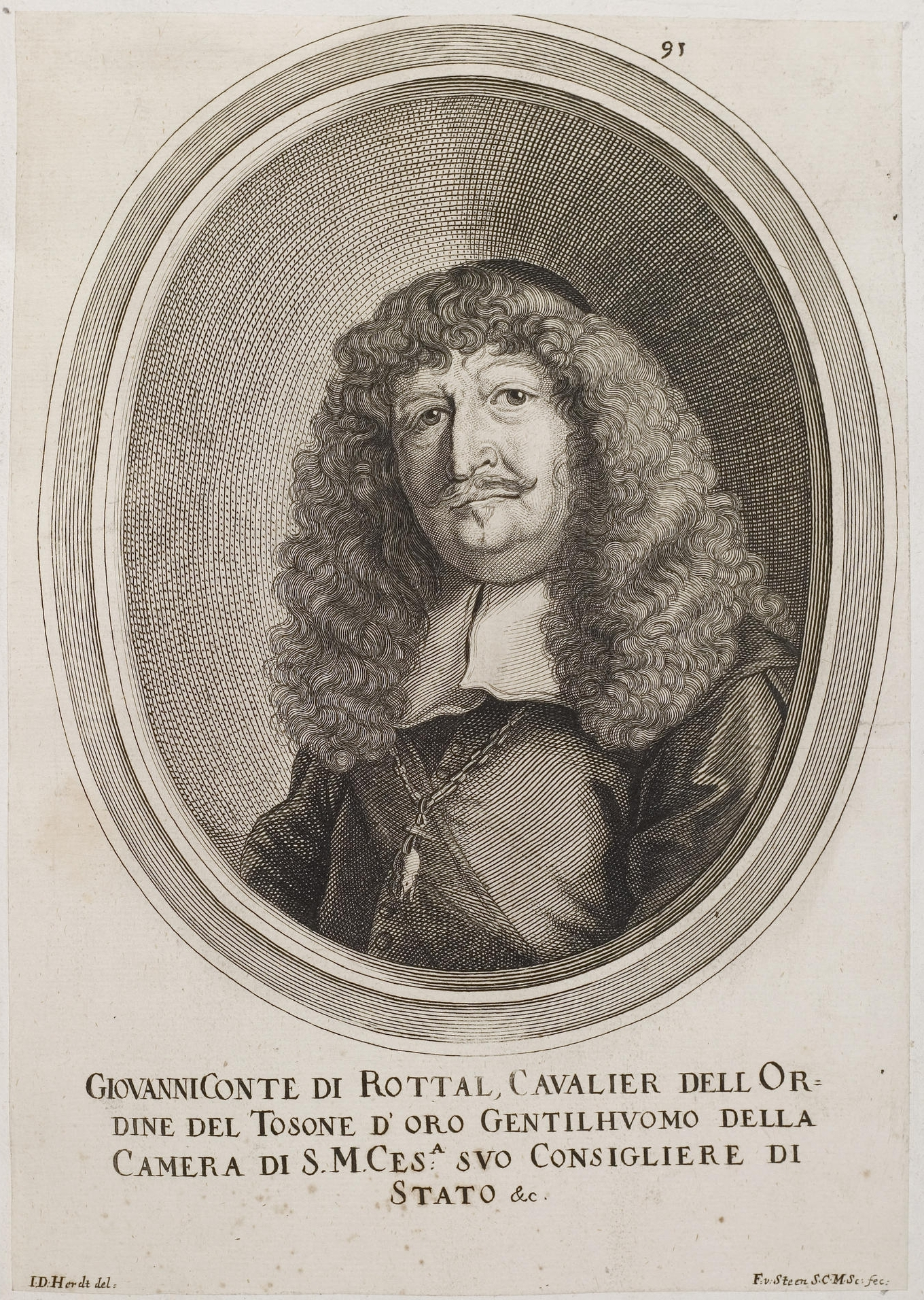 Grafik aus dem Klebeband Nr. 2 der Fürstlich Waldeckschen Hofbibliothek Arolsen Motiv: Johann von Rottal (1605–1674), Landeshauptmann von Mähren, kaiserlicher Kommissar in Ungarn und Siebenbürgen; Österr. Verwaltungsbeamter